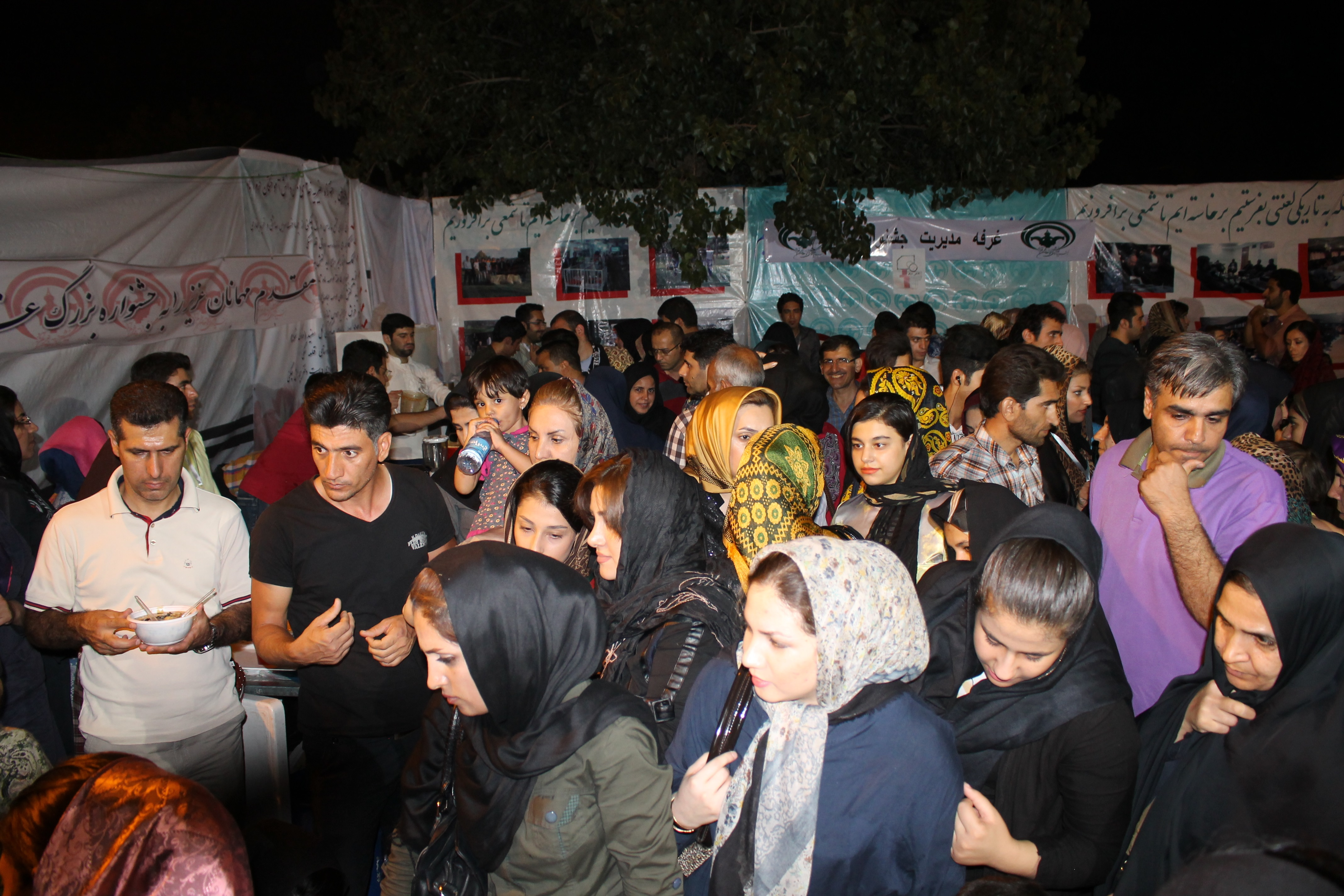 جشنواره خیریه غذا